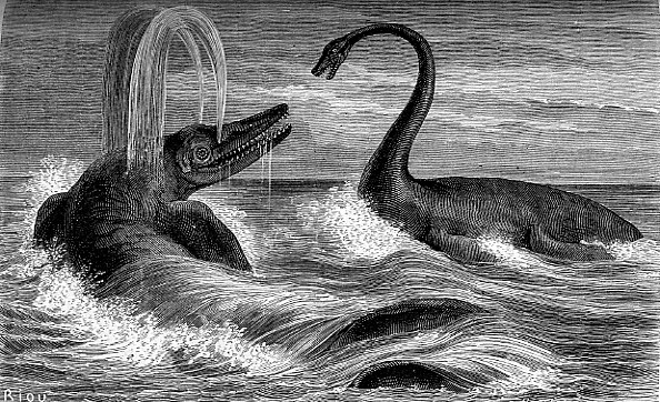 Description: Louis Figuier, La Terre avant le Déluge, édition de 1864 Fig.130. L'ichthyosaure et le plésiosaure, illustration par Riou. Edition originale scannée. Source: Hugo Soria